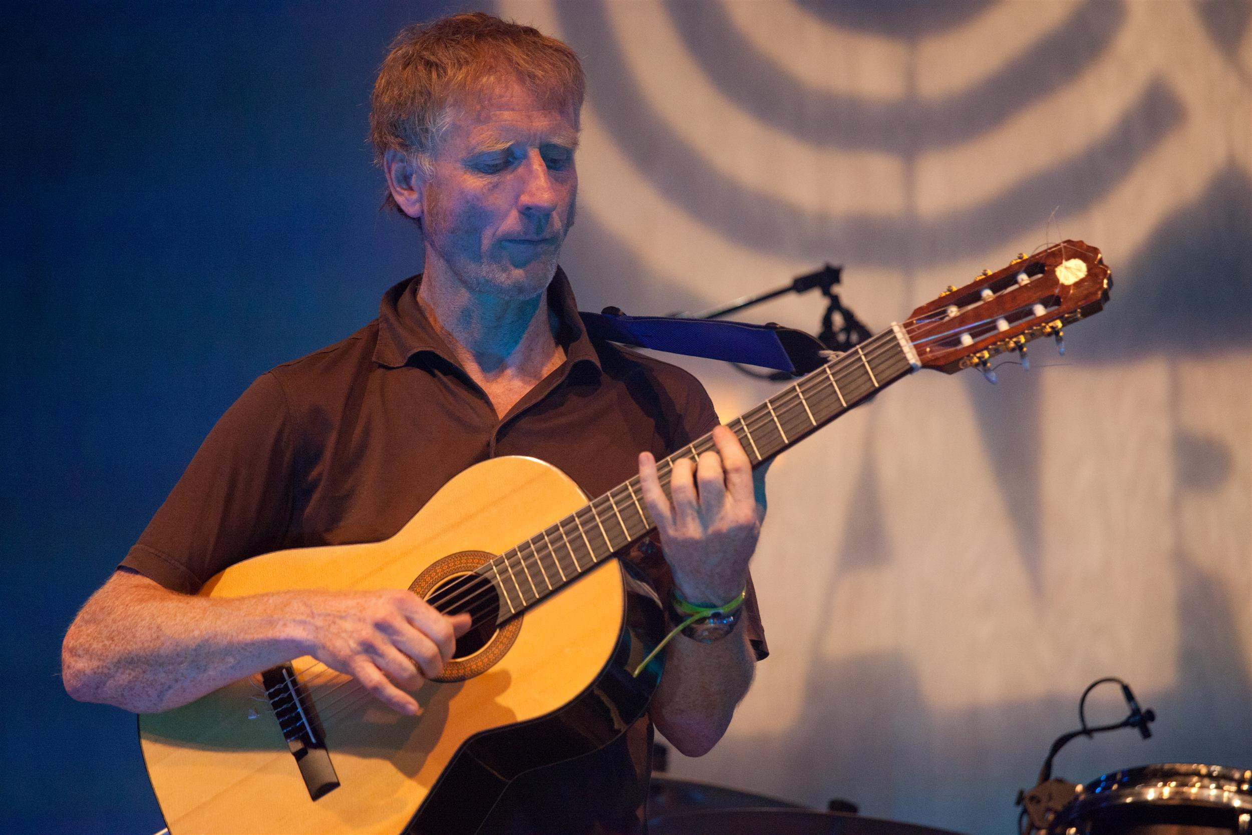 Alterna2 - Foto: Xavi Torrent